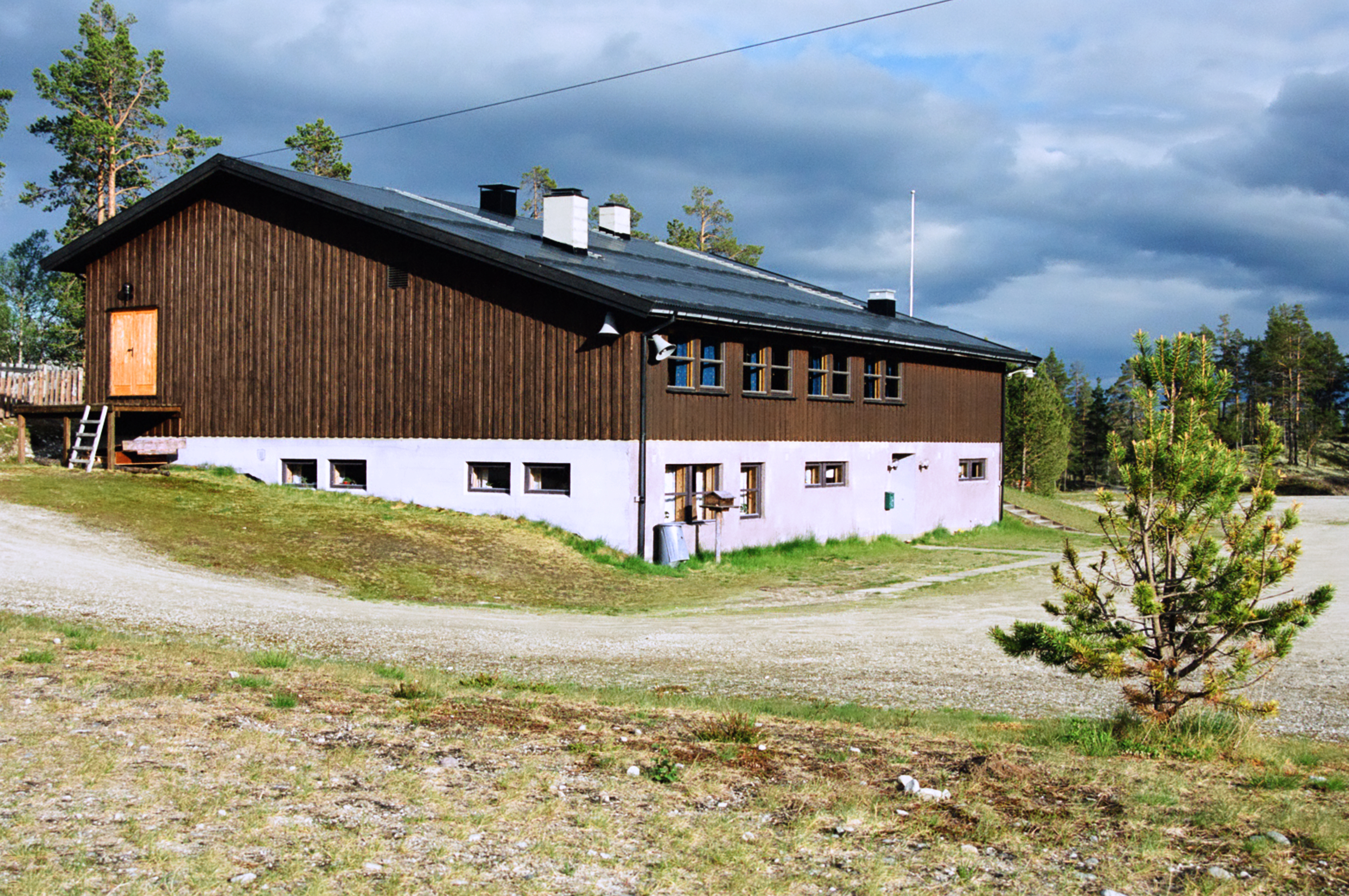 Et bilde av samfunnshuset Skogtun i bygda Sømådalen.